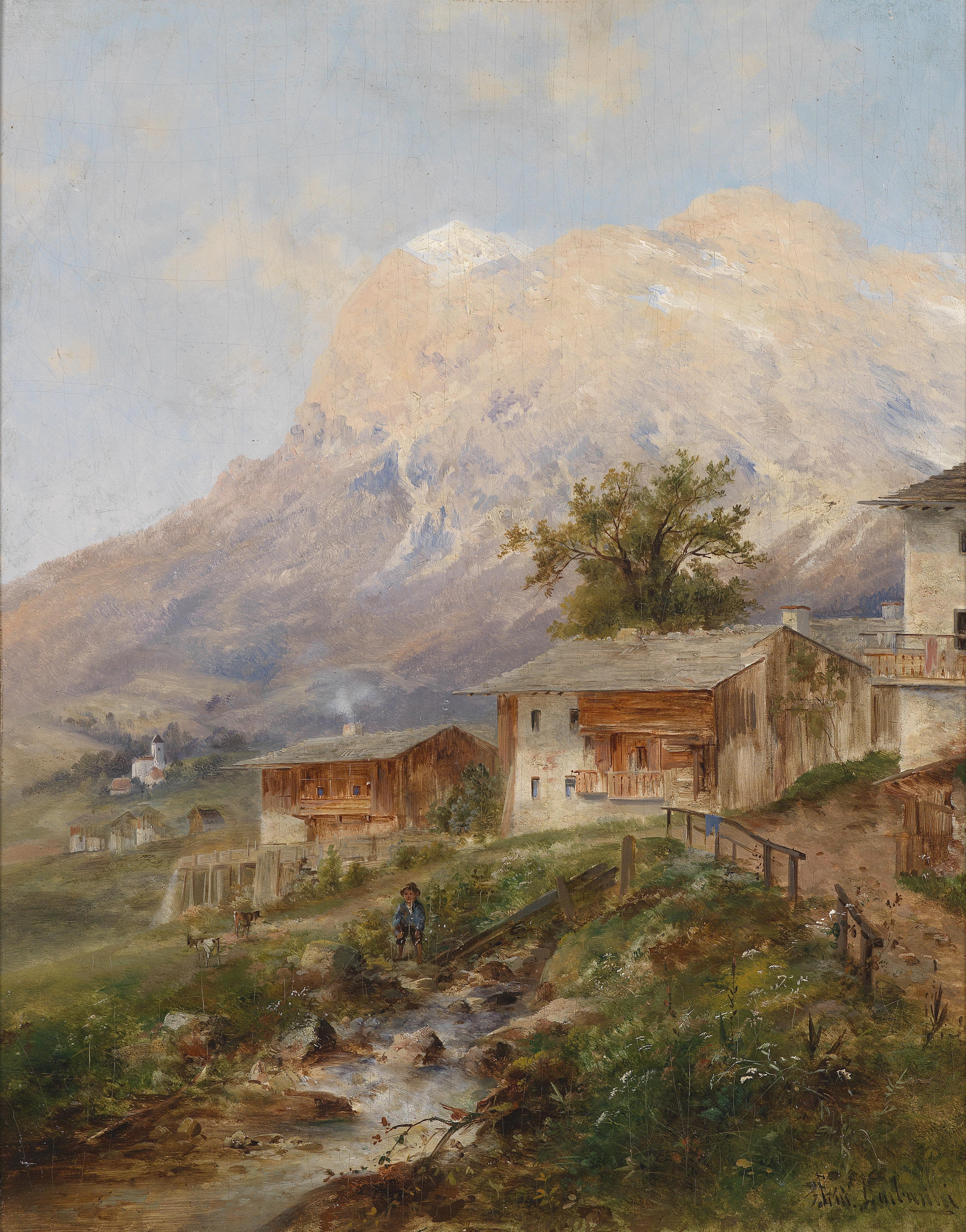 Bei Cortino im Ampezzo Tallabel QS:Lde,"Bei Cortino im Ampezzo Tal"